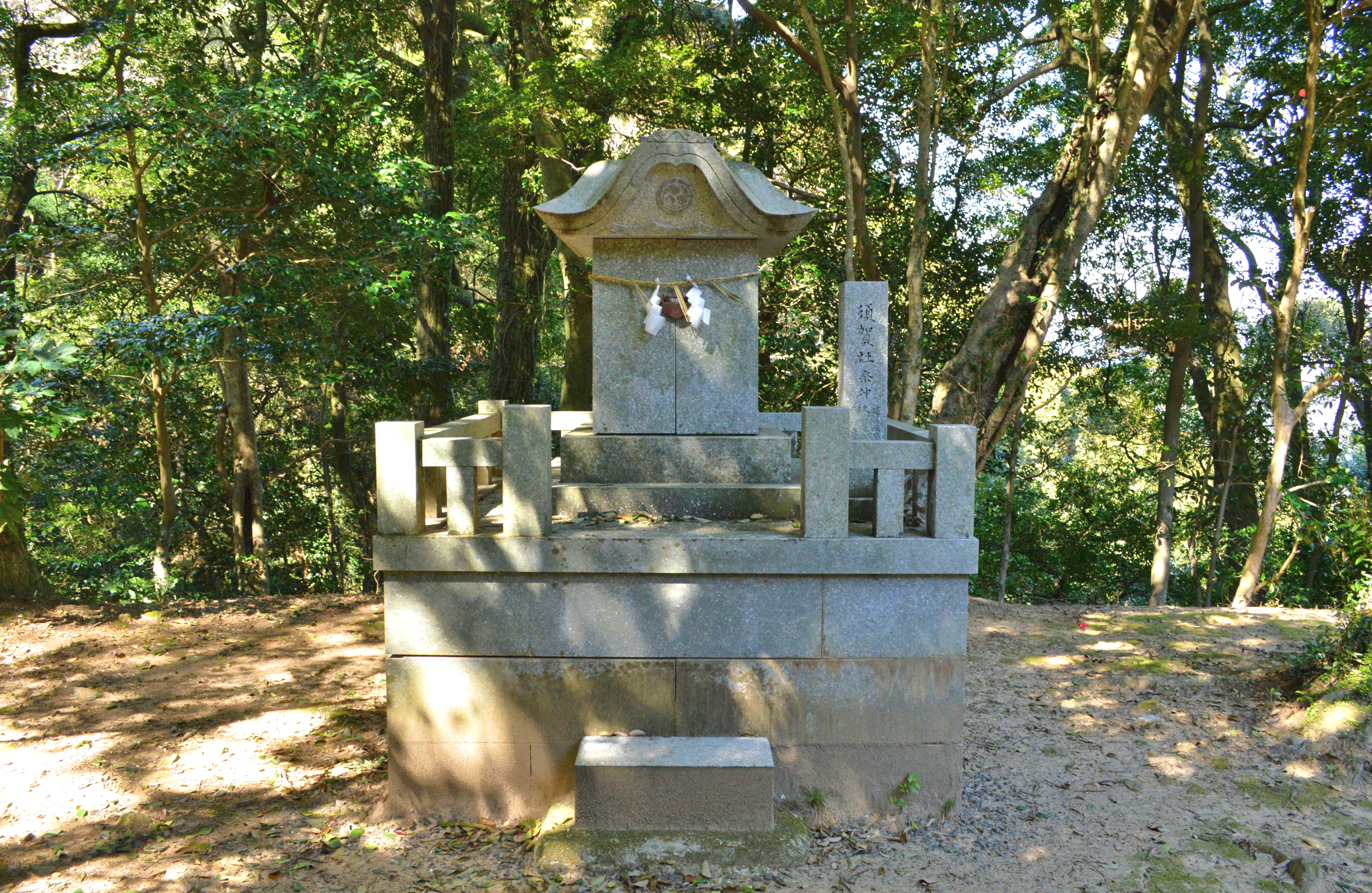 石城神社境内 須賀社